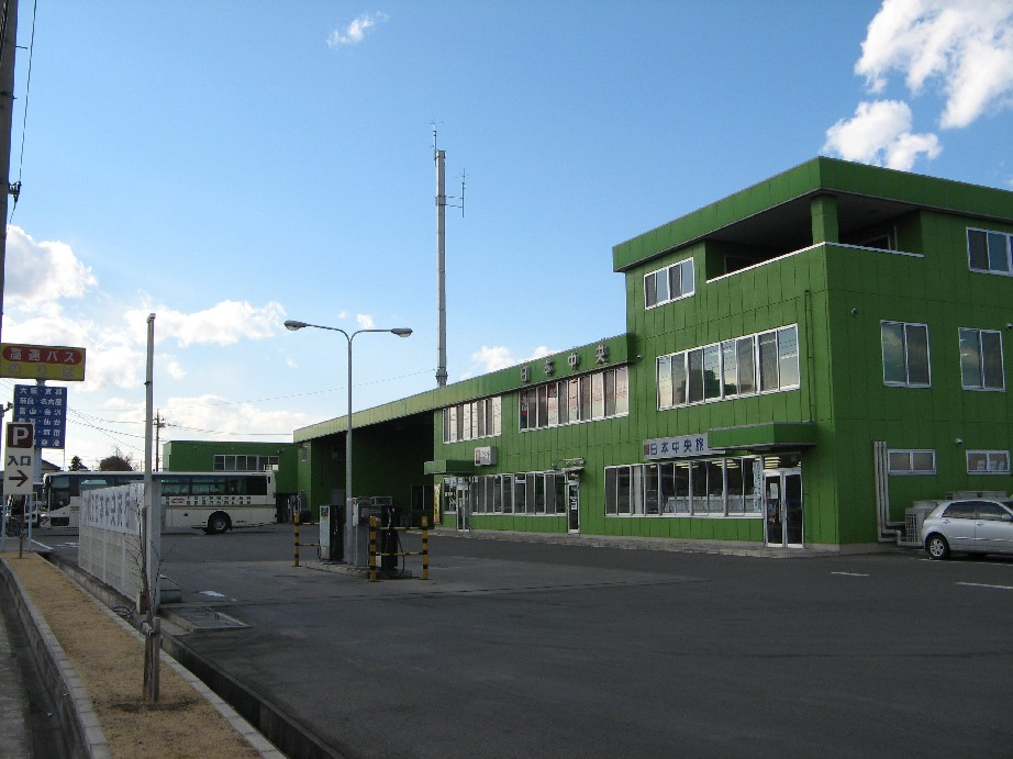 日本中央バス本社。及び前橋営業所。公道上より撮影。